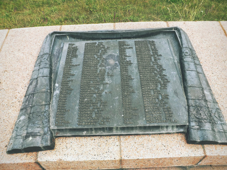 Гранитная плита с фамилиями погибших во время боев на Букринском плацдарме